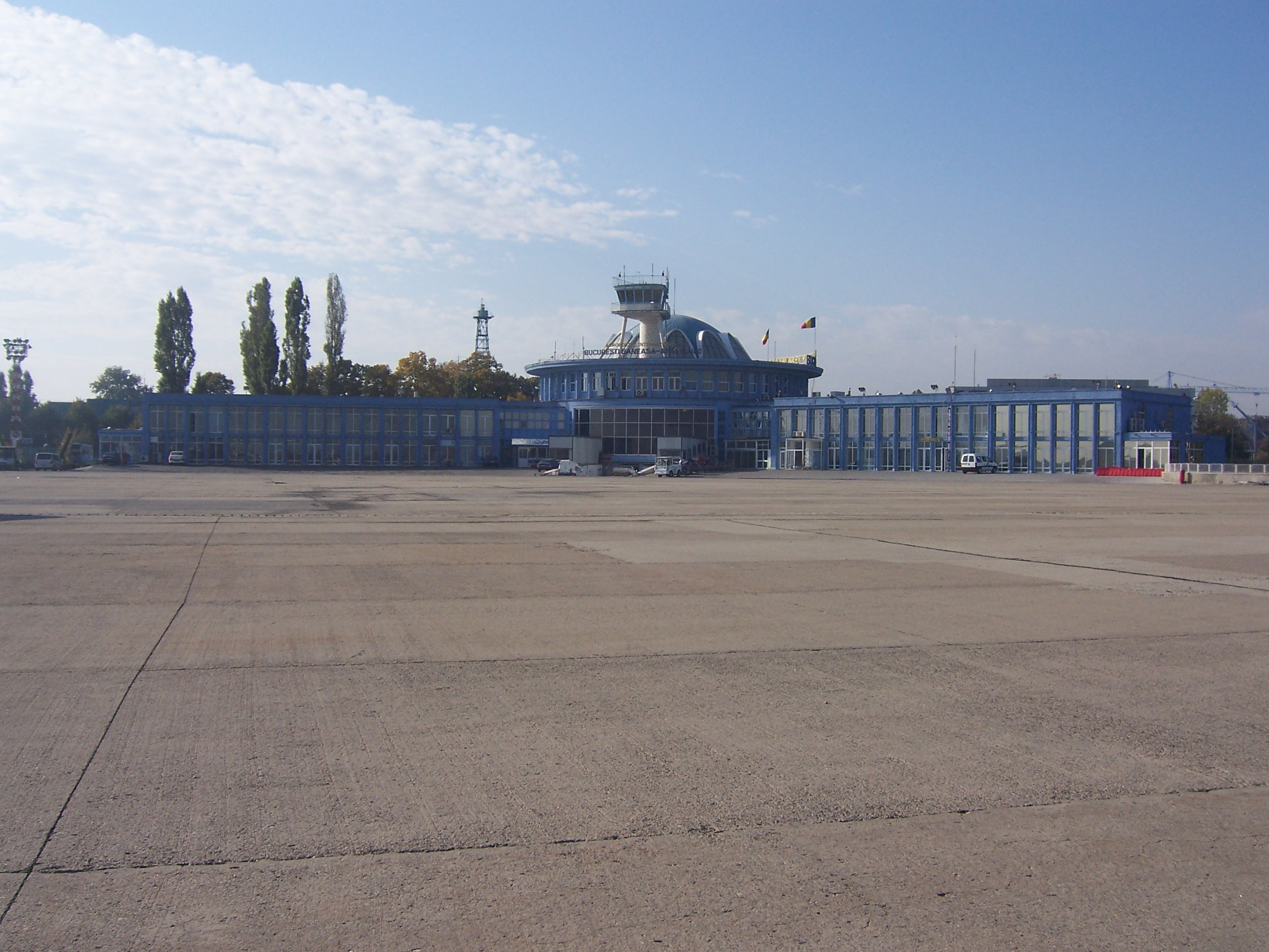 Aerogara Aeroportului Baneasa - Aurel Vlaicu in data de 09.11.2007.